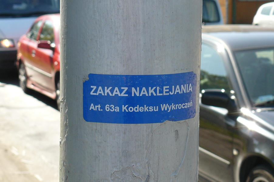 Informacja o art. 63a K.w. na słupie sygnalizaji świetlnej w Poznaniu.